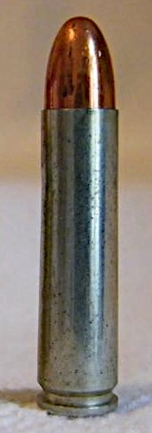 Патрон .30 Carbine